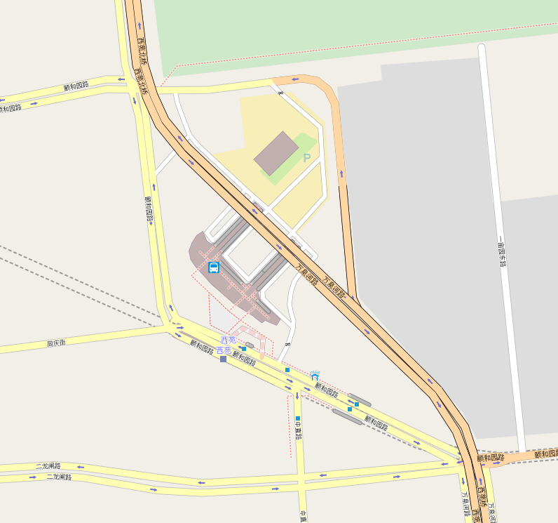 西苑交通枢纽周边地图，取自OpenStreetMap